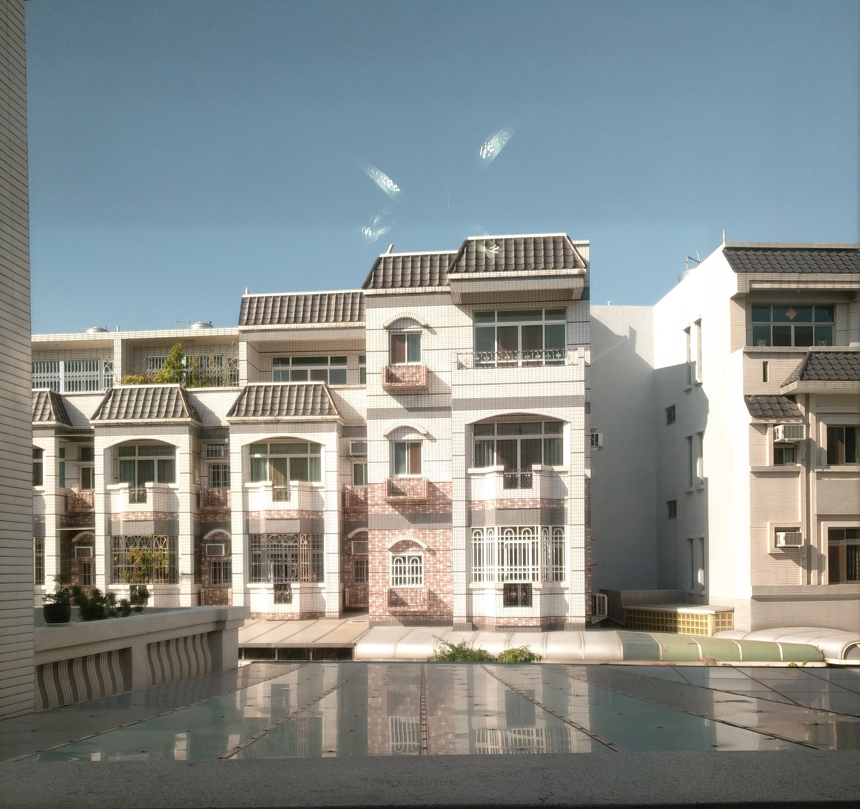 虎尾大成社區